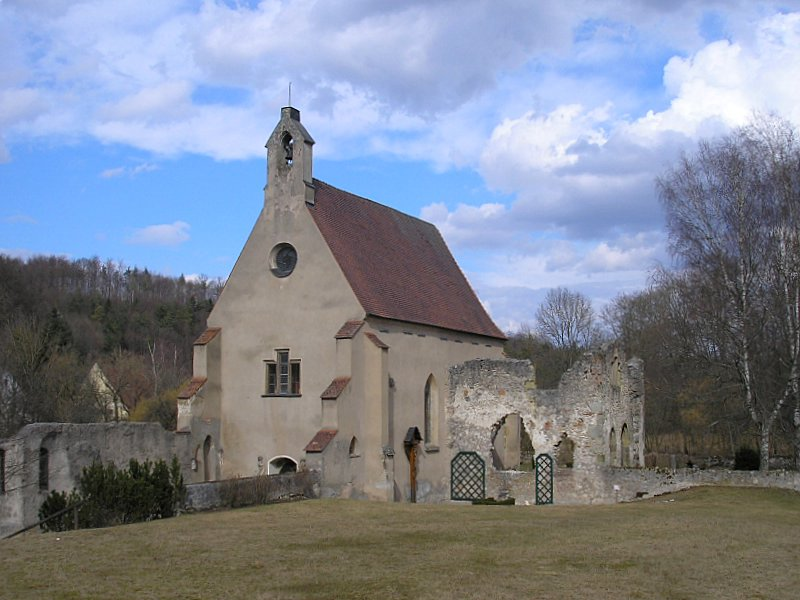 Die Klosterkirche von Nordwesten. Eigene Aufnahme, April 2006